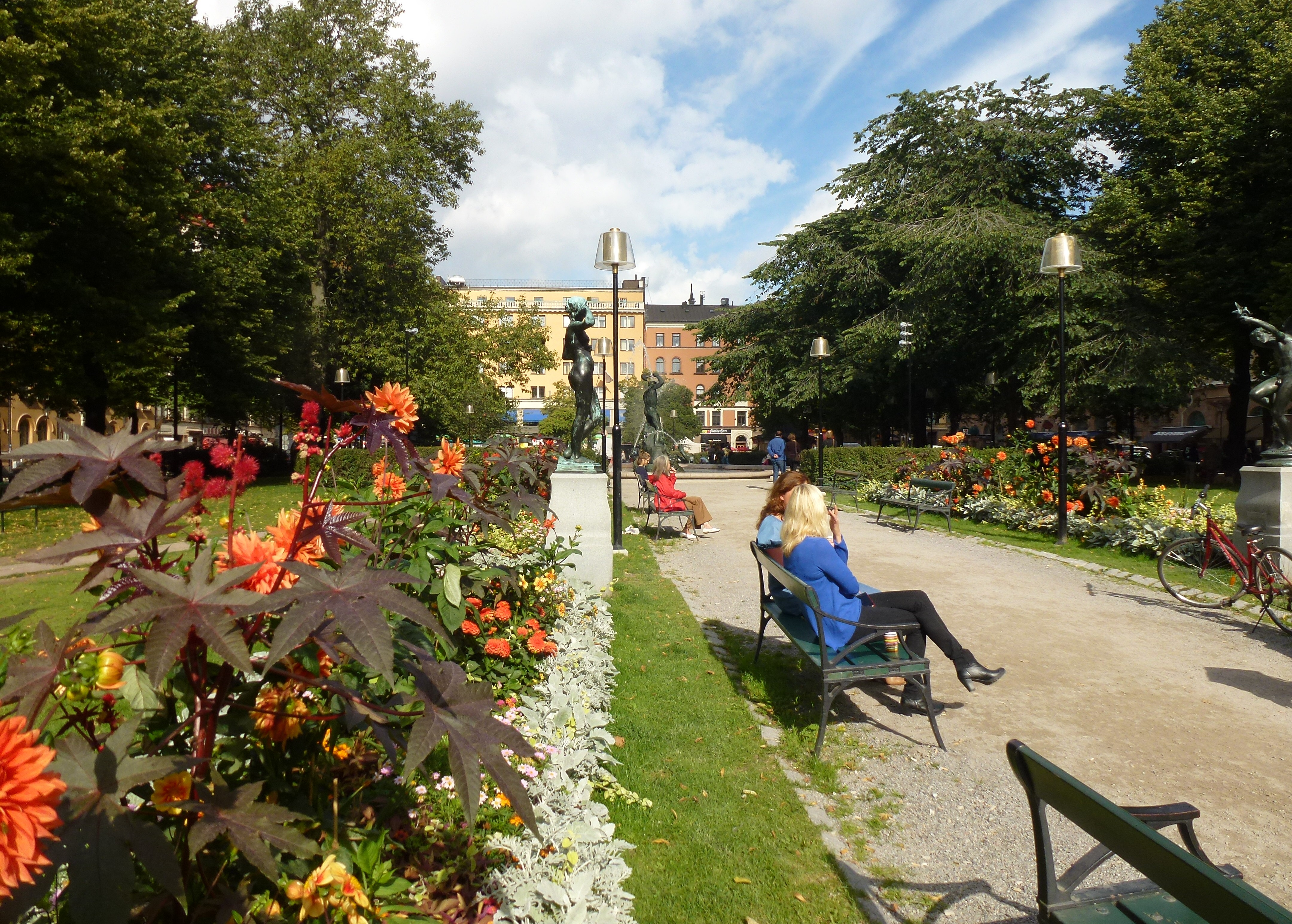 Mariatorget mot norr